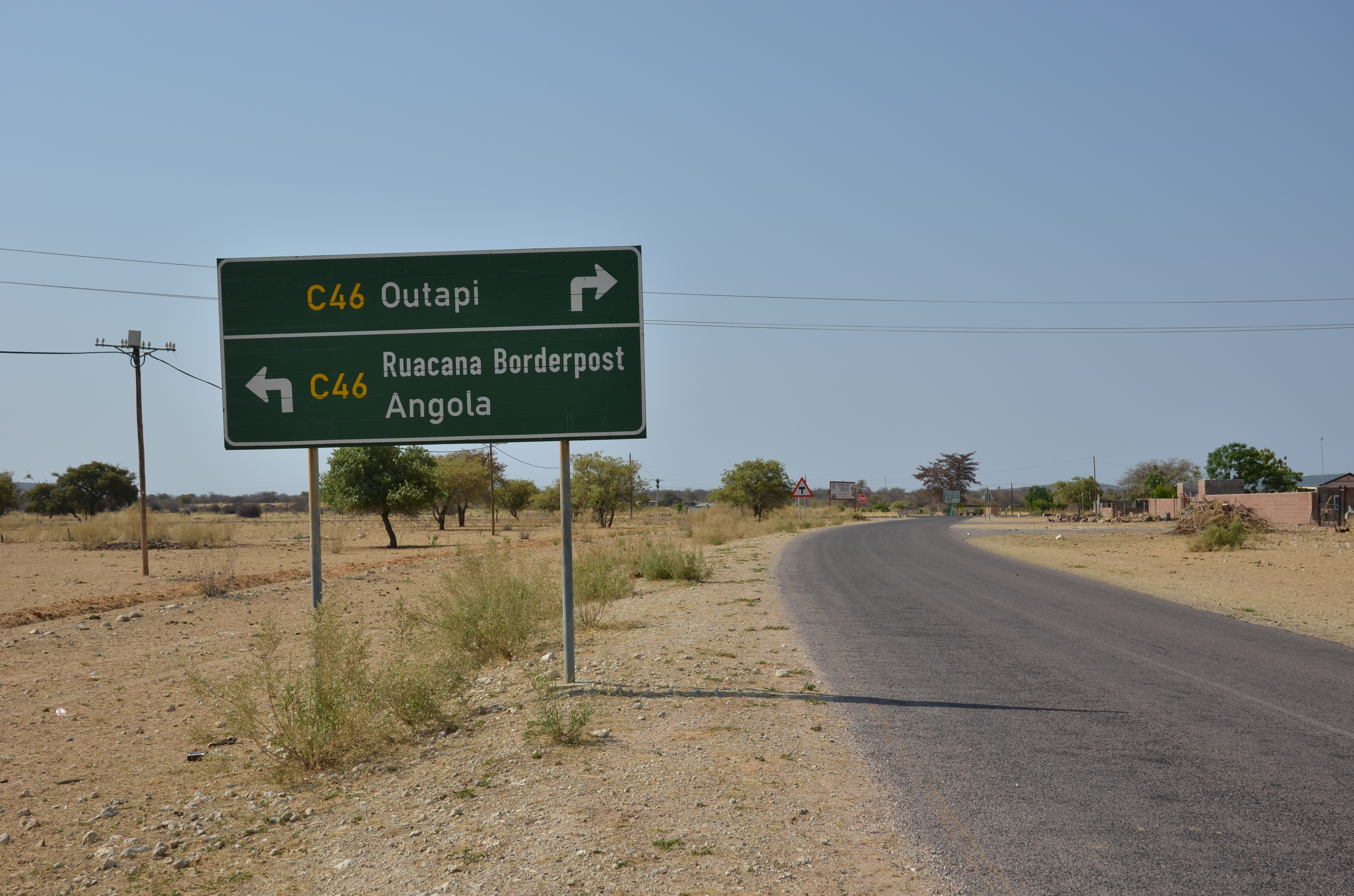 U hranice s Angolou - Namibie